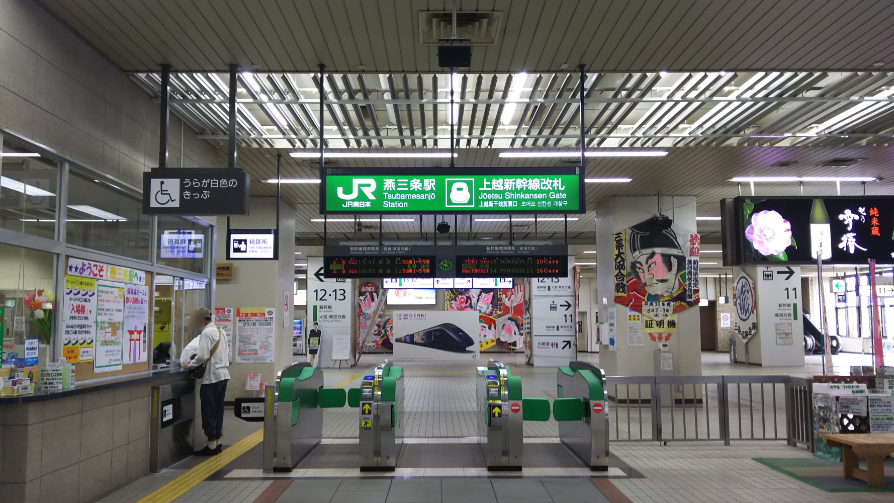 燕三条駅新幹線改札